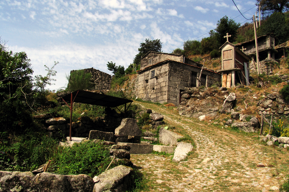 Bezeguimbra